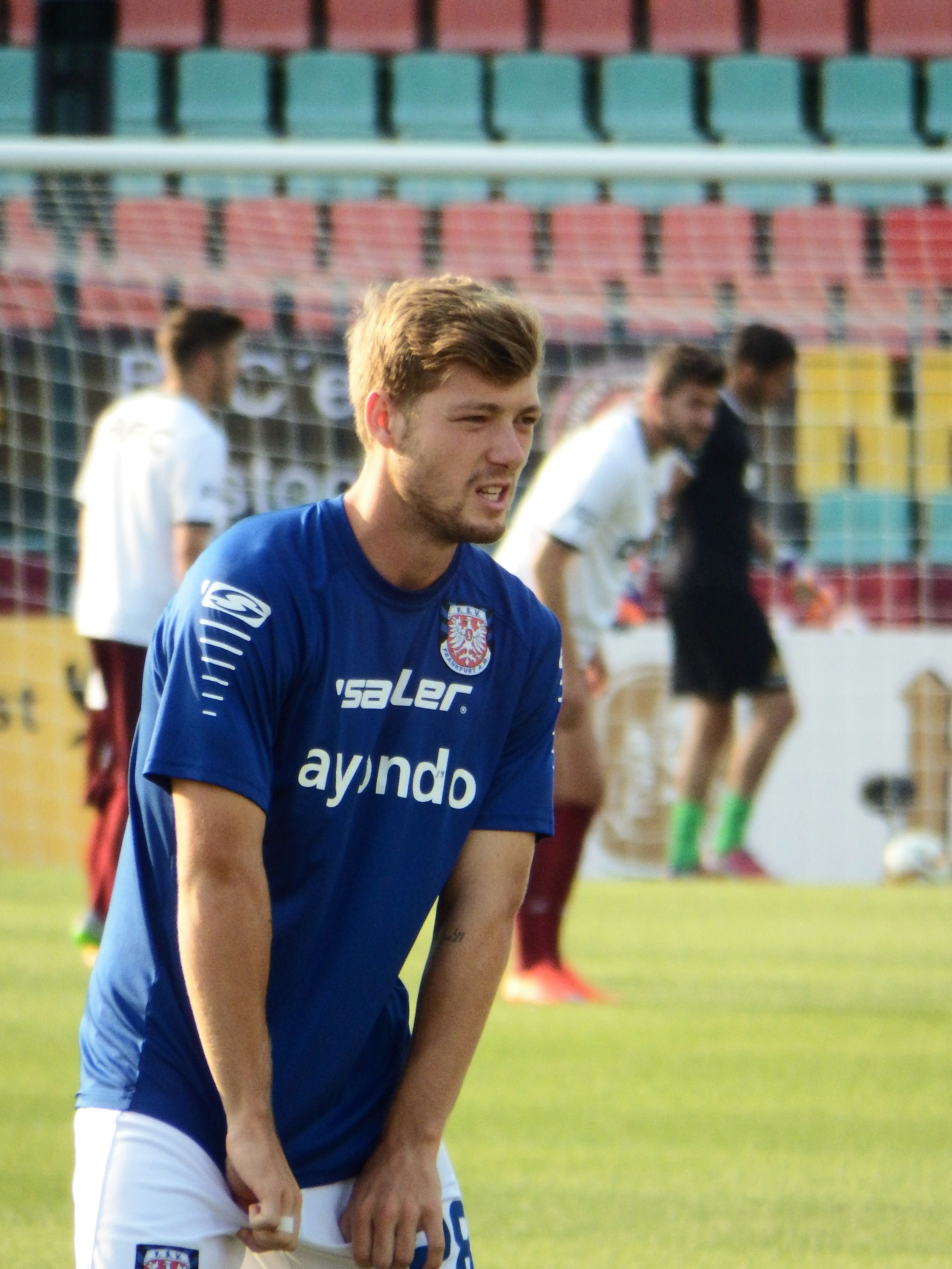 Rolim, Yann FSV Frankfurt 15-16